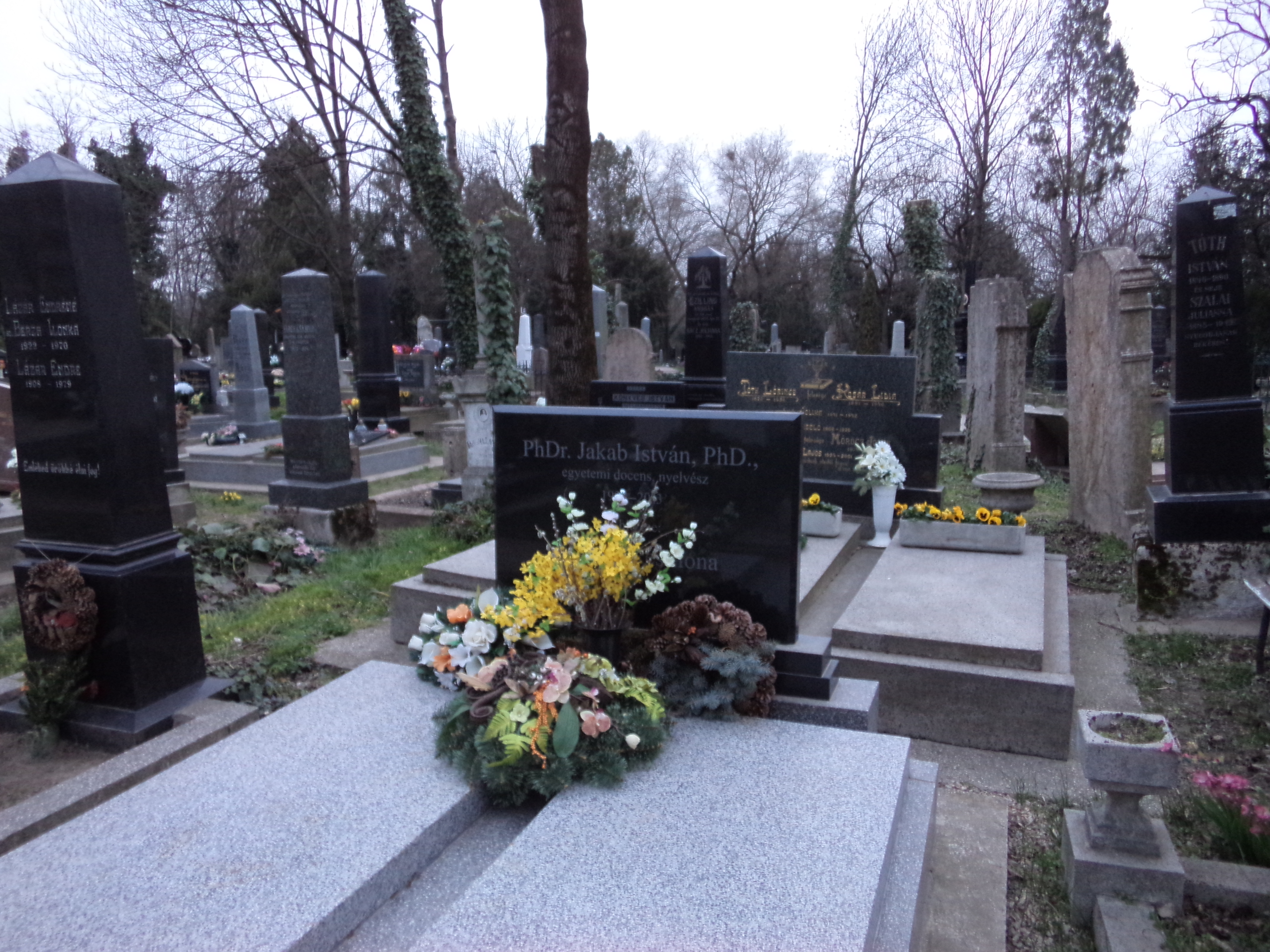 Jakab István - Komáromi temető